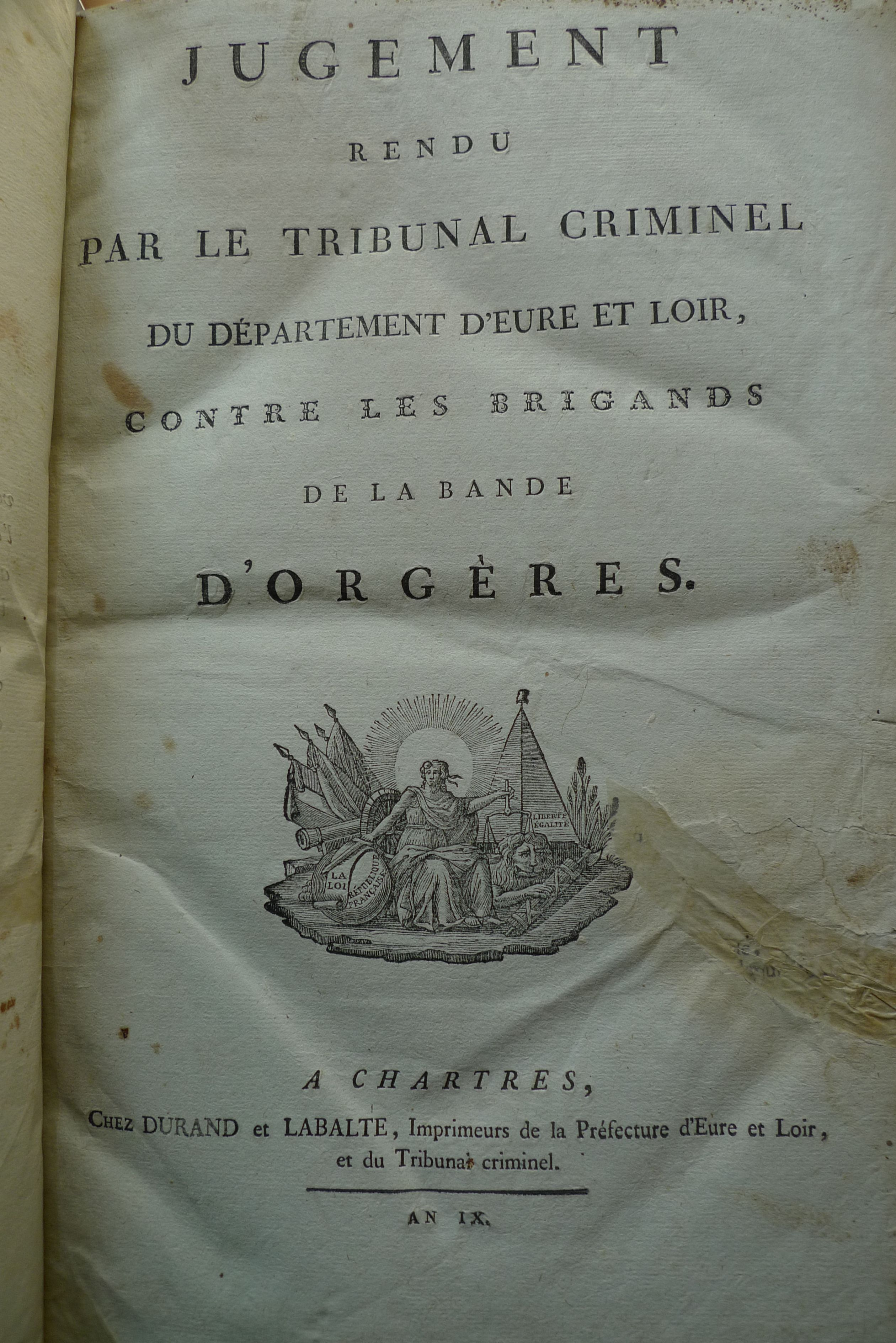 Extrait (page de titre) des minutes du procès des chauffeurs d'Orgères (Lire en ligne).